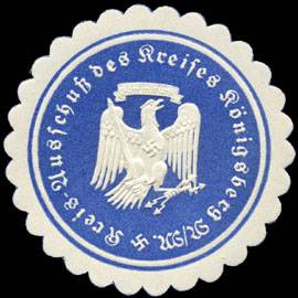 Sealing stamp Title: Kreis - Ausschuß des Kreises Königsberg Description: blau, weiß, geprägt Place: Königsberg size: 4 cm